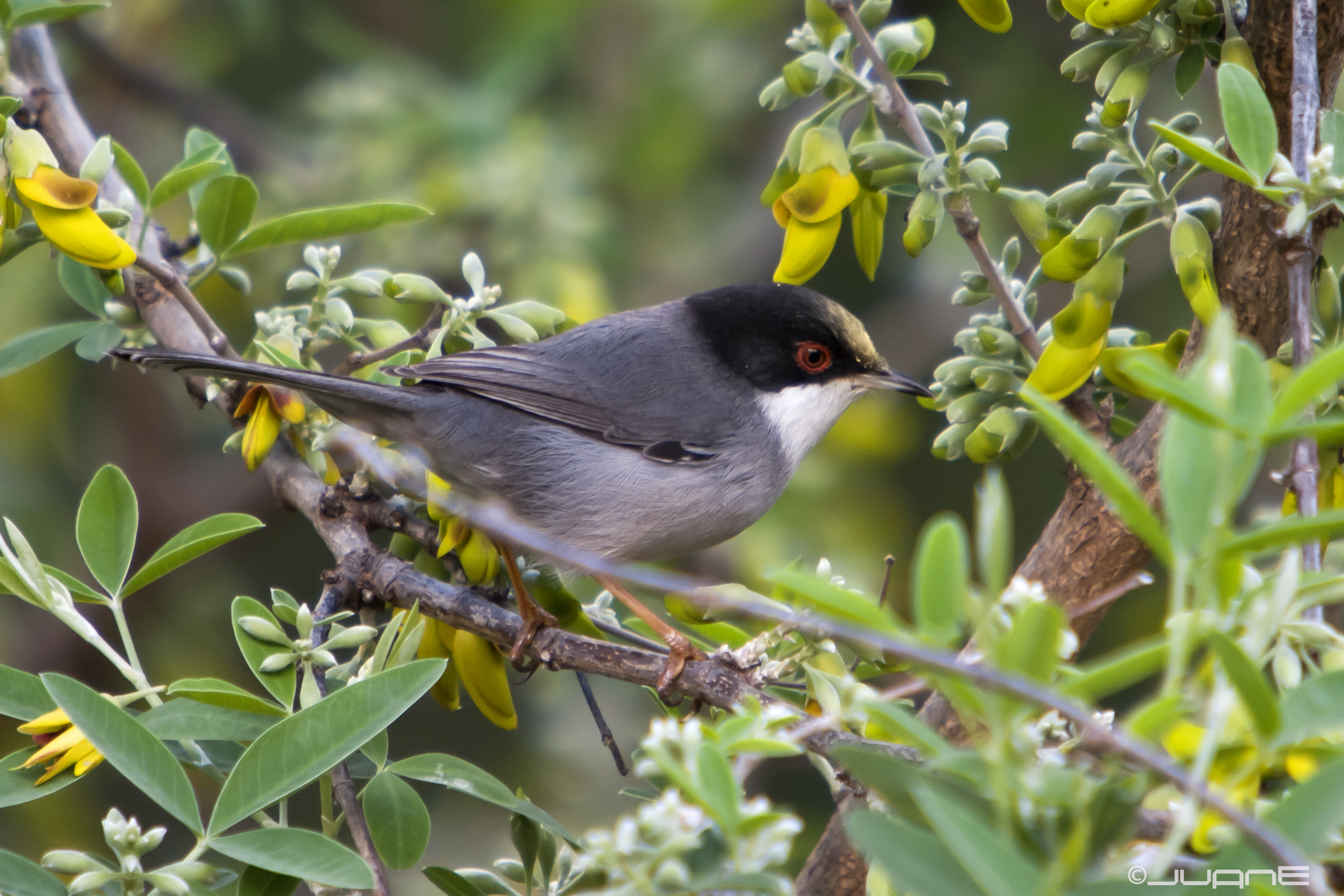 Curruca Cabecinegra, Sylvia melanocephala(♂)